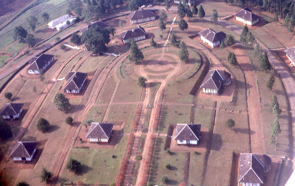 Au fond et en bordure du Centre, ma "case" en lisière de la station agronomique de recherches de l'IRAT. Je n'étais donc pas loin pour aller prendre l'apéro institutionnel entre blancs.